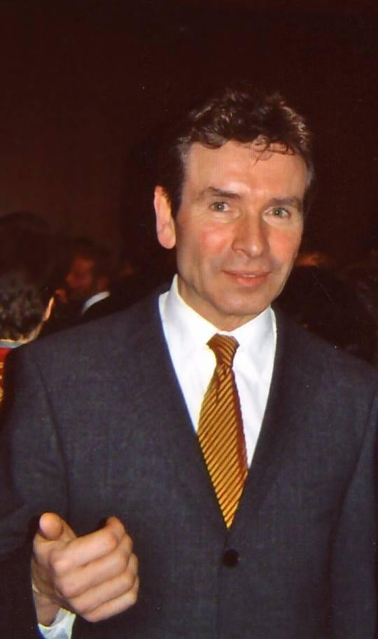 Hamburgs Ex-Senator Roger Kusch (Bildausschnitt)in der Landesvertretung BW(Berlin)